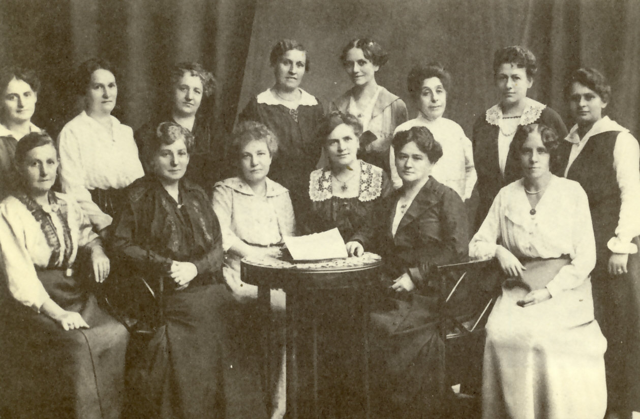 Frauenreichskommitee und Niederösterreichischer Landesausschuss 1917. 1. Reihe: Marie Schuller, Anna Boschek, Therese Schlesinger (geb. Eckstein), Amalie Seidel, Adelheid Popp, Gabriele Proft 2. Reihe: Josefine Deutsch, Marie Münzker, Amalie Pölzer, Marie Bock, Emmy Freundlich, Anna Kaff, Olga Hönigsmann, Mathilde Eisler